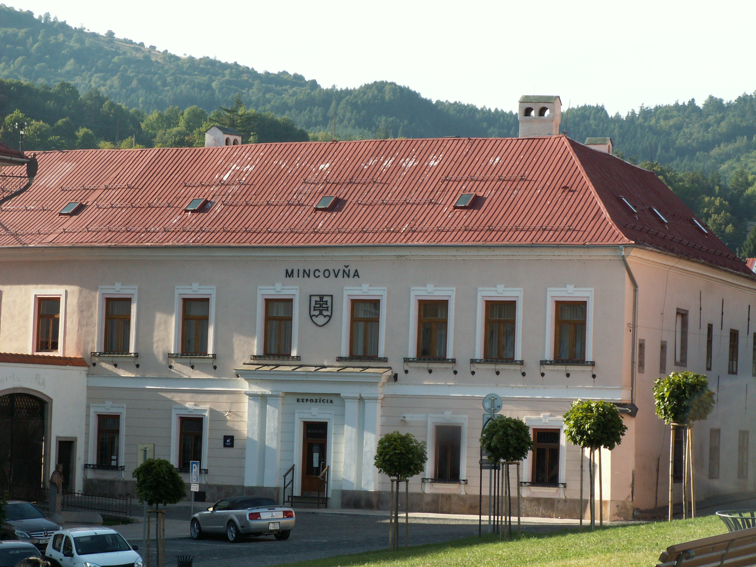 Mincovna. Kremnická mincovňa vznikla 17. novembra 1328